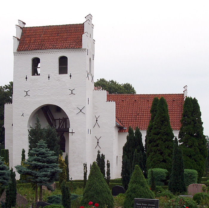 Kirken set fra vest da: Gylling Kirke, Hads Herred, Århus Amt , Danmark